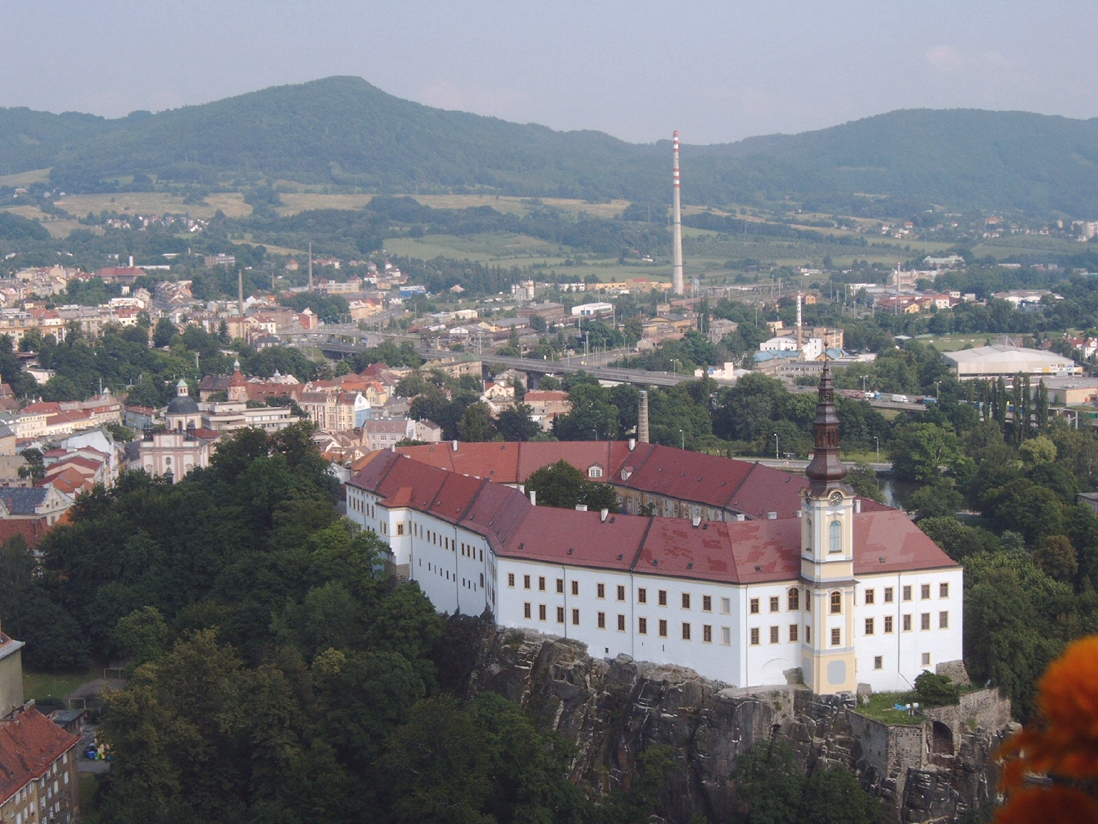 Pohled z Pastýřské stěny na děčínský zámek